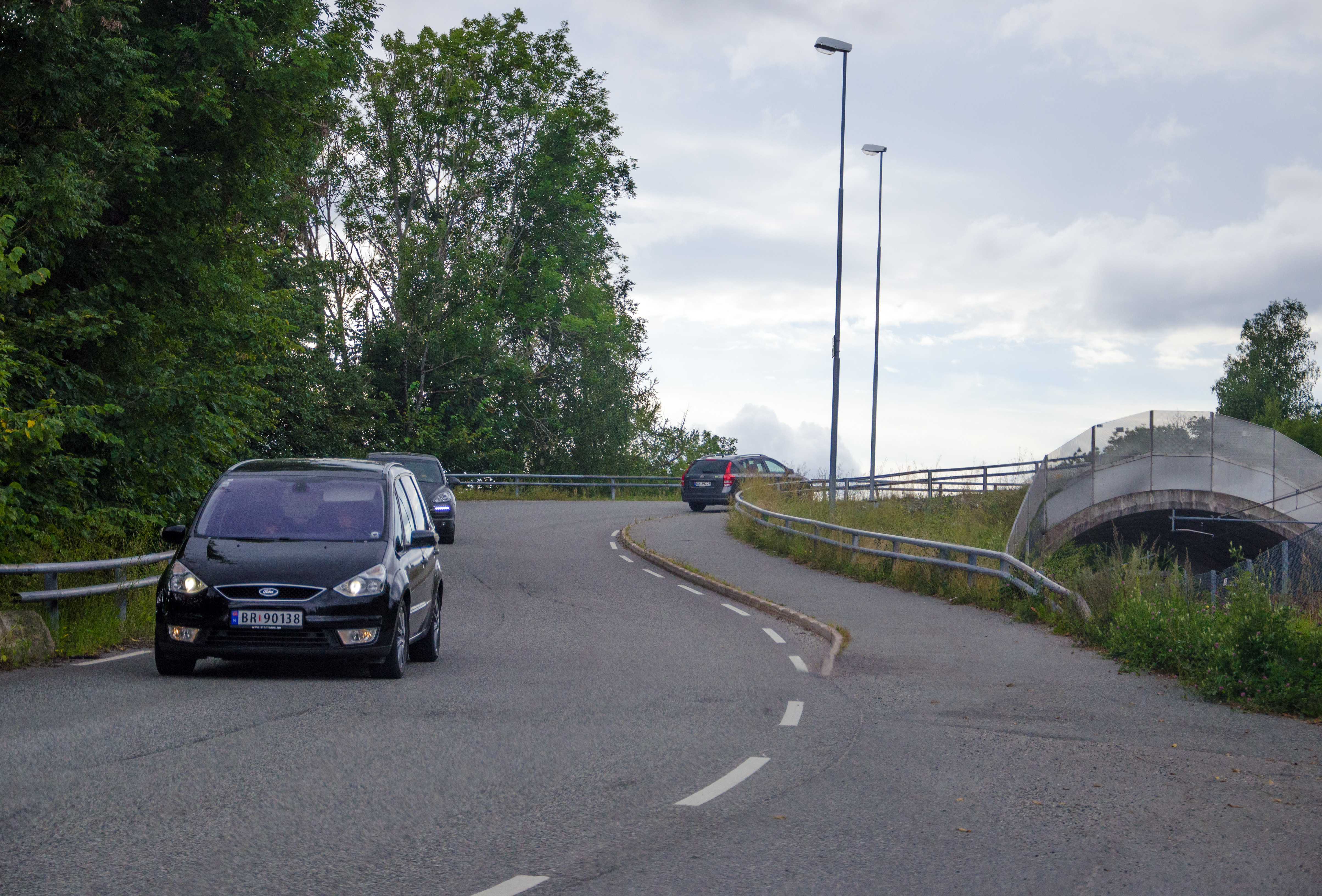 Fylkesvei 10 Spikkestadveien, Røyken bru